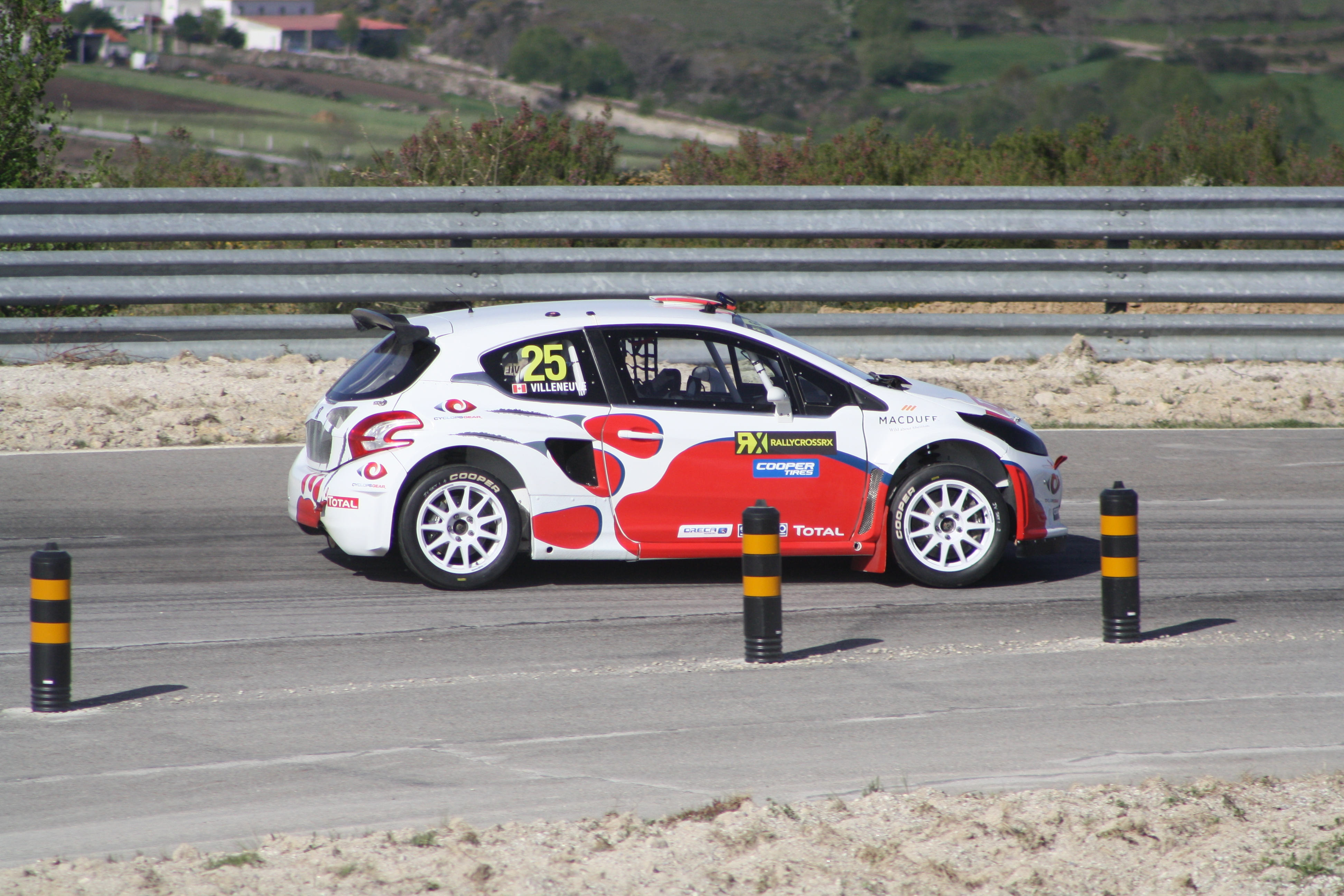 Jacques Villeneuve en Portugal la primera ronda del Campeonato del Mundo de Rallycross.